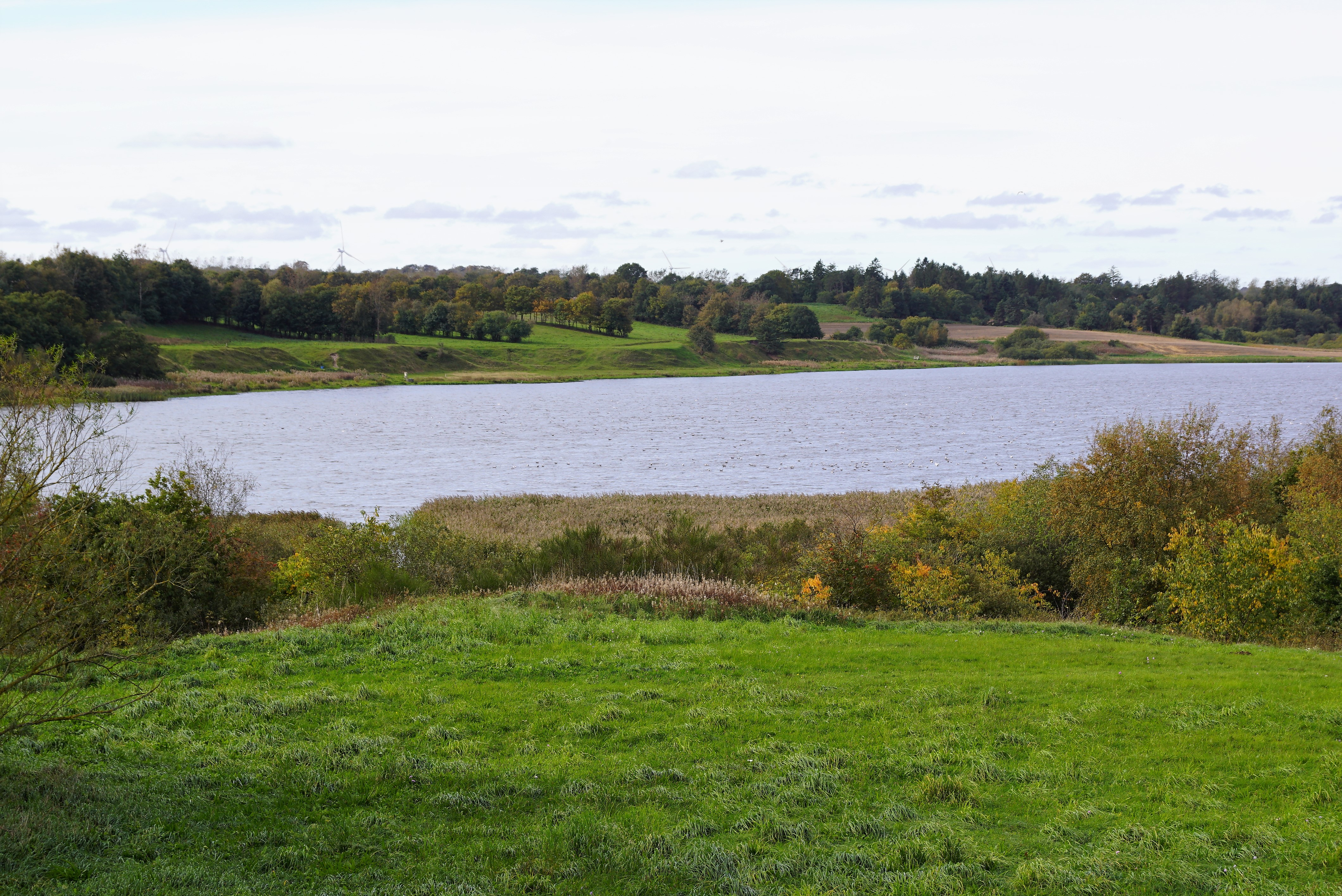 Sydenden af Stubbergård Sø